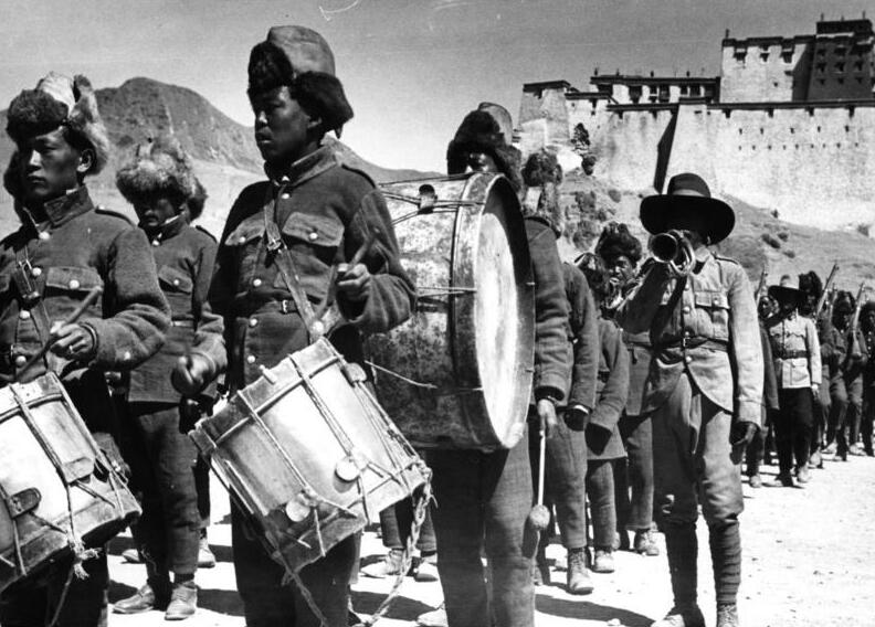 Schigatse, tibetisches Militär mit Dzong, Truppenparade